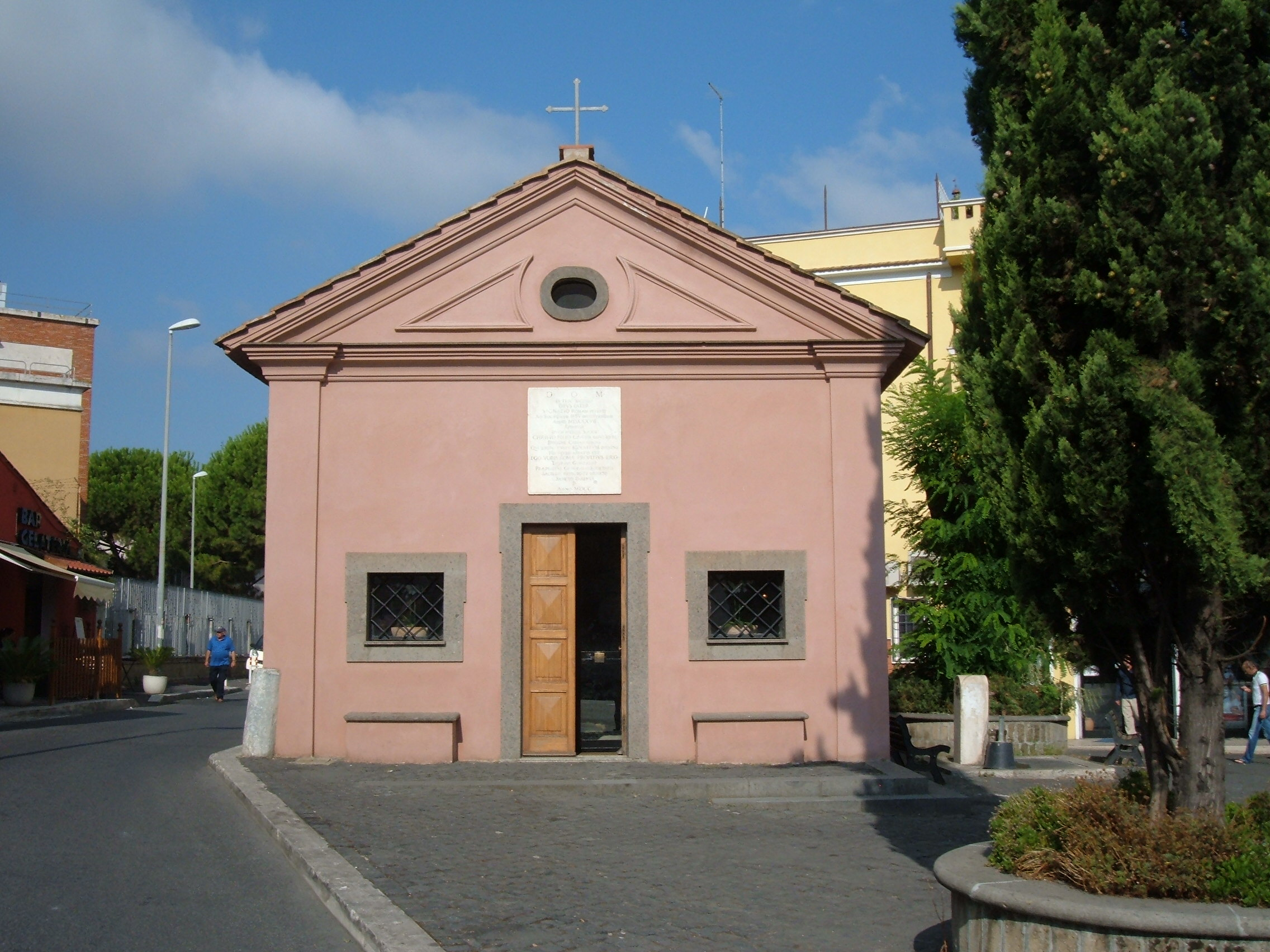 Cappella di Sant'Ignazio, in località La Storta, a Roma.